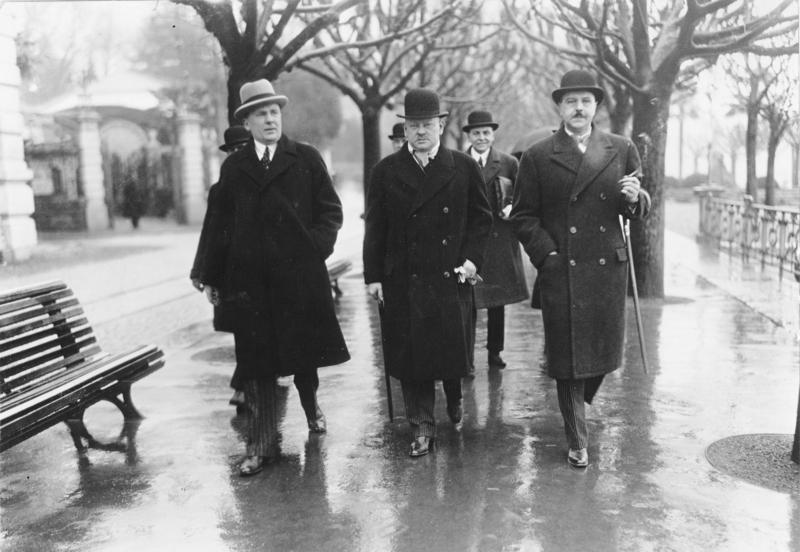 Erste Aufnahmen von der Völkerbundskonferenz in Lugano/Schweiz - unseres nach dort entsandten Sonder-Bild-Berichterstatters! Reichsaussenminister Dr. [Gustav] Stresemann auf dem Wege zur Völkerbundssitzung in Lugano. ("First pictures of the League of Nations Conference in Lugano, Switzerland: Our special photographer was there! Reich Foreign Minister [Gustav] Stresemann on the way to the League of Nations meeting in Lugano.")